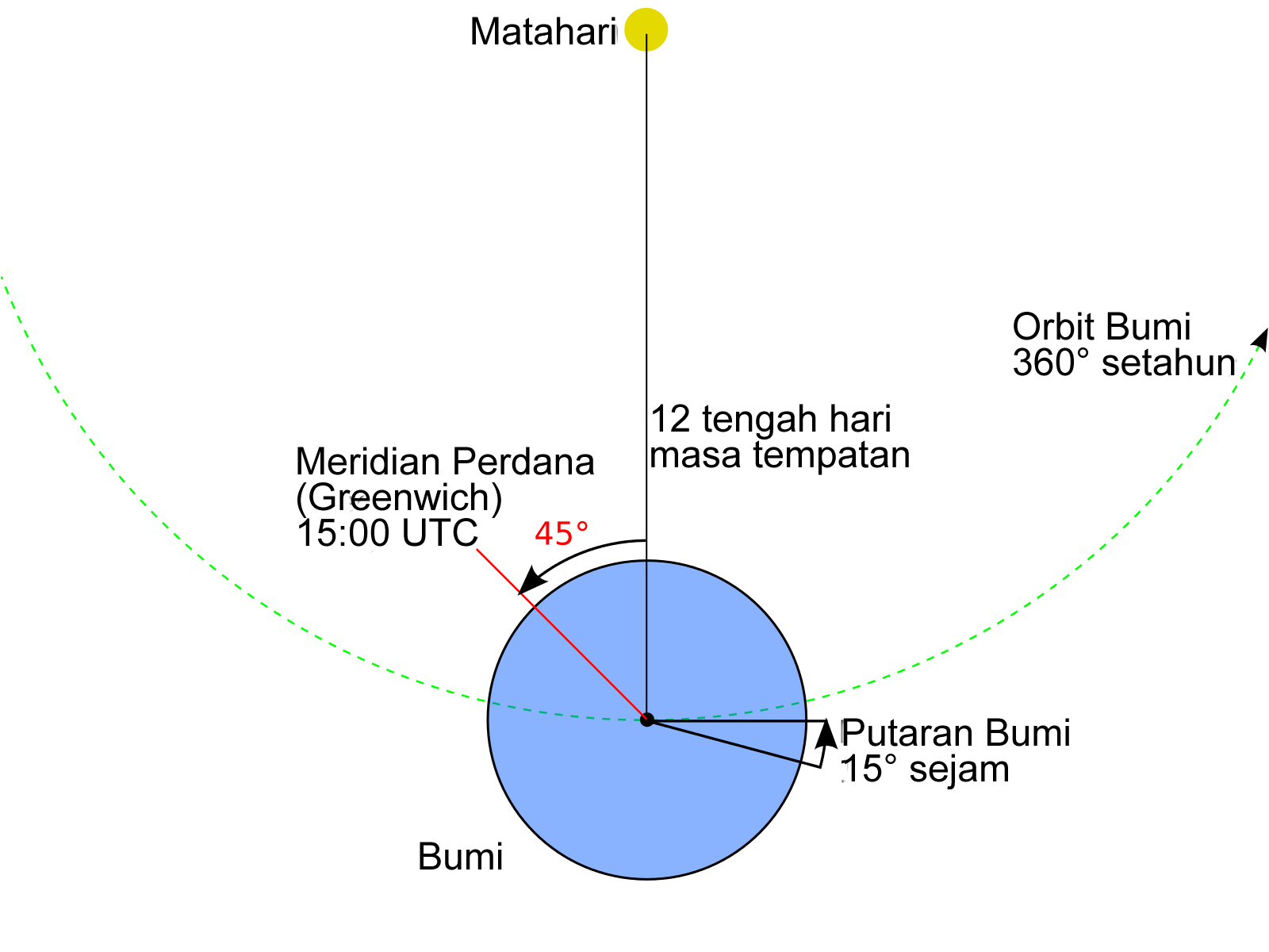 Longitud relatif kepada kedudukan (Greenwich) boleh dikira dengan kedudukan matahari dan masa rujukan (UTC / GMT).